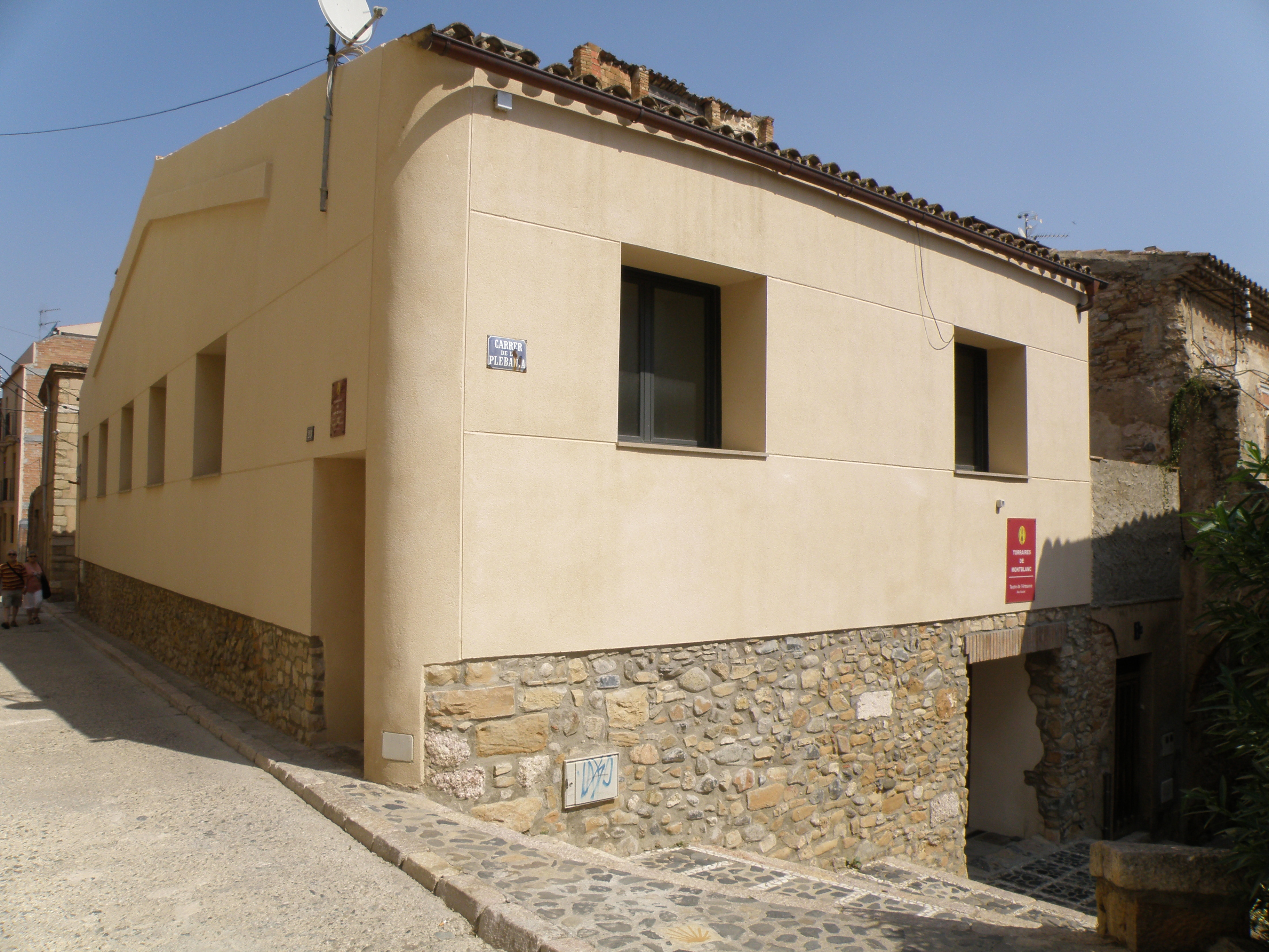 Teatre l'Artesana (Montblanc). Vista des de la placeta a l'intersecció dels carrers Plebania i Escultor Belart.